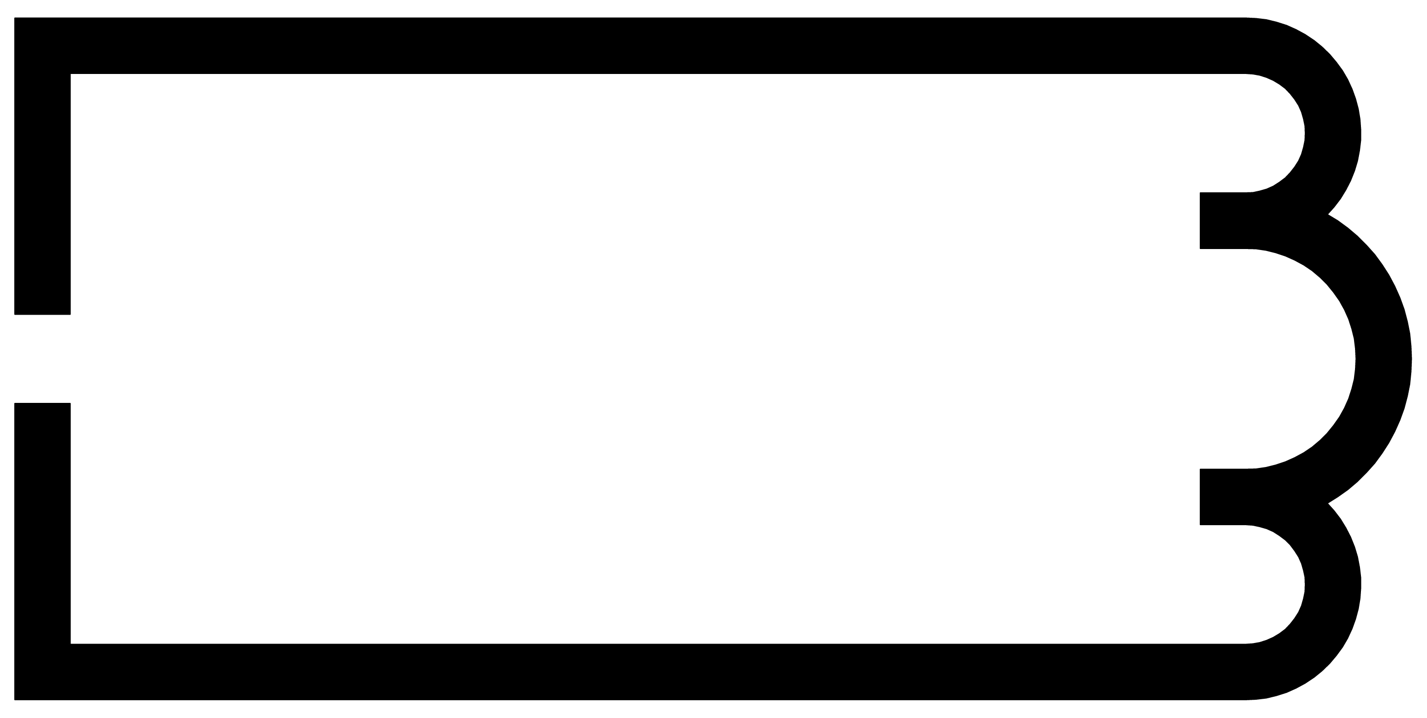 Chiesa I (abbazia di Leno), VIII secolo. Fonte: Andrea Breda, L’indagine archeologica nel sito dell’abbazia di S. Benedetto di Leno, Brixia Sacra, 2006, II, p. 118